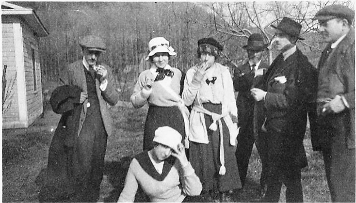 Photographie réunissant Robert de Roquebrune, Mme Fernand Préfontaine, née Rose-Anne Bélanger, Mme Robert de Roquebrune, née Josée Angers, Ozias Leduc, Léo-Pol Morin, Robert Mortier et Jane Mortier (assise), prise par Fernand Préfontaine, à Saint-Hilaire, le 4 mai 1918, épreuve à la gélatine argentique, 6,7 x 11,1 cm, Musée national des beaux-arts du Québec, Québec. Quelques-uns des collaborateurs – musiciens, peintres et écrivains – de la revue multidisciplinaire Le Nigog sont réunis sur cette photographie.